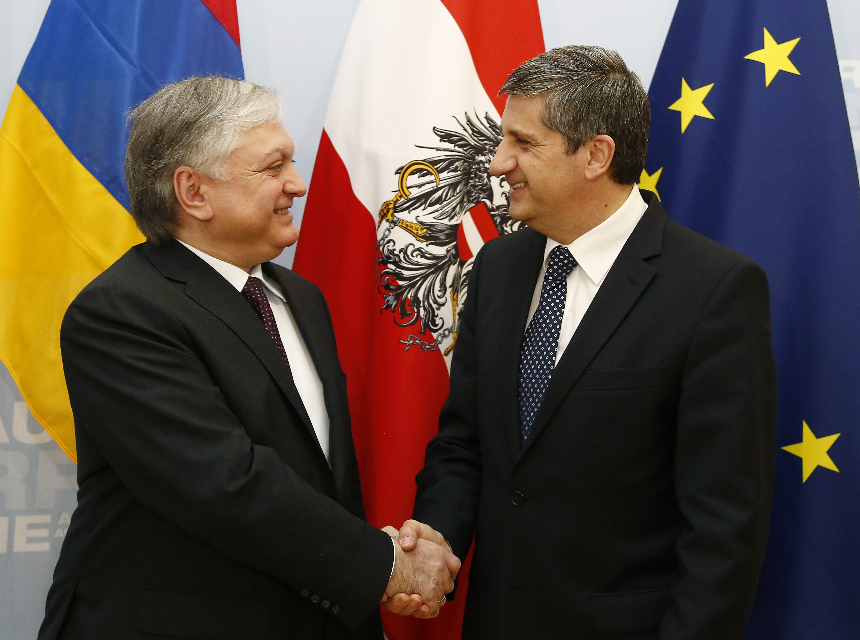 Vizekanzler Michael Spindelegger empfängt den armenischen Aussenminister Edward Nalbandjan zu einem Gespräch. Wien, 25.02.2013, Foto: Dragan Tatic